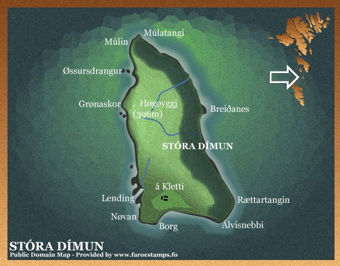 Stóra Dímun, Faroe Islands